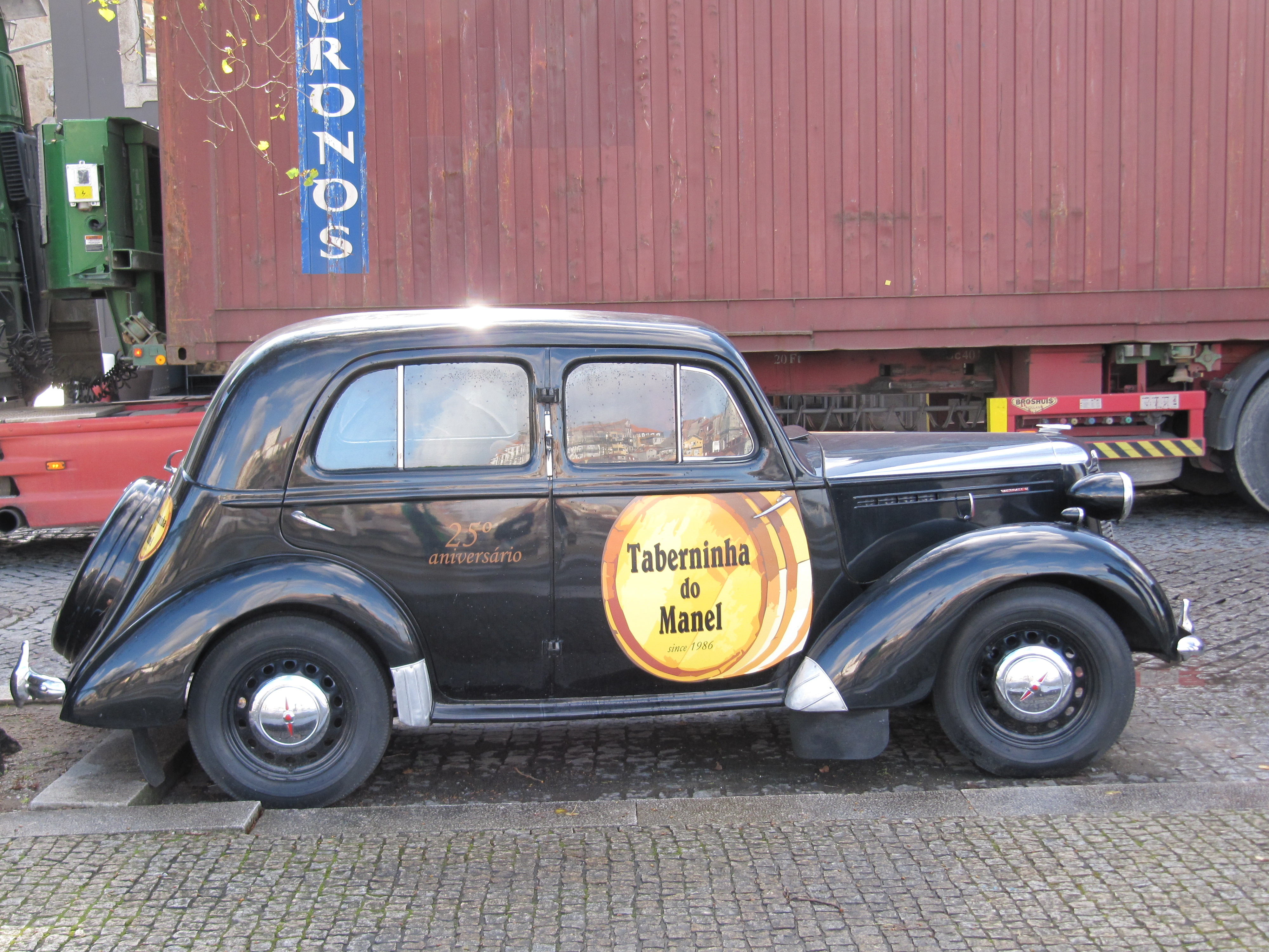 Oldstyle